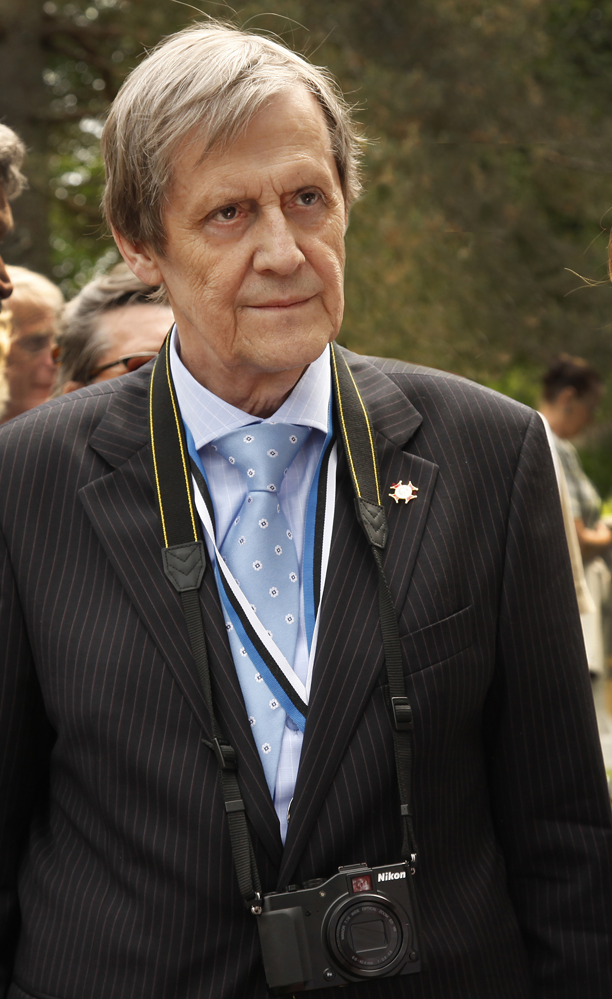 Jüri Martin, bioloog (lihhenoloog), poliitik ja haridusettevõtja 2014